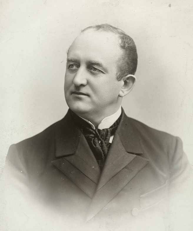 Olav Voss (1901), portrett, mann, skuespiller, vignettert brystbilde. Påskrift på baksiden: "Til August Oddvar venskabeligst Olav Voss".